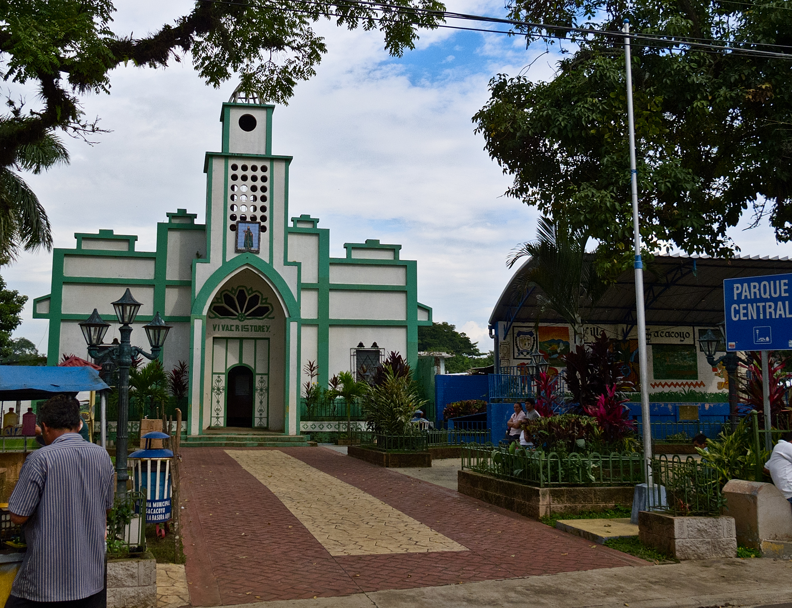 Parque Central, desde la calle, de Sacacoyo, La Libertad, El Salvador